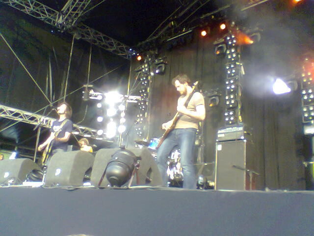 THE SHEER WAS ER OOK